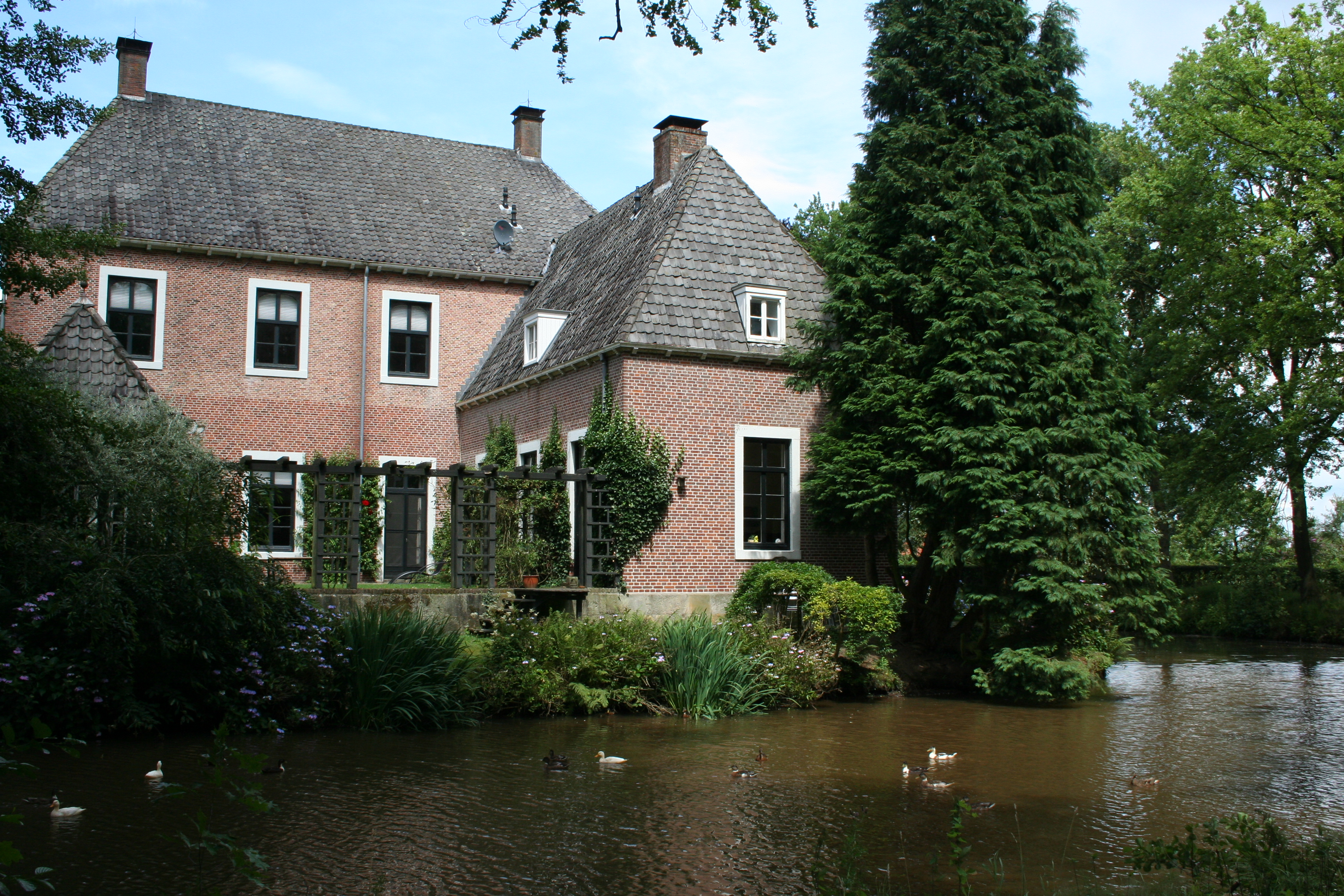 De Herinckhave te Tubbergen